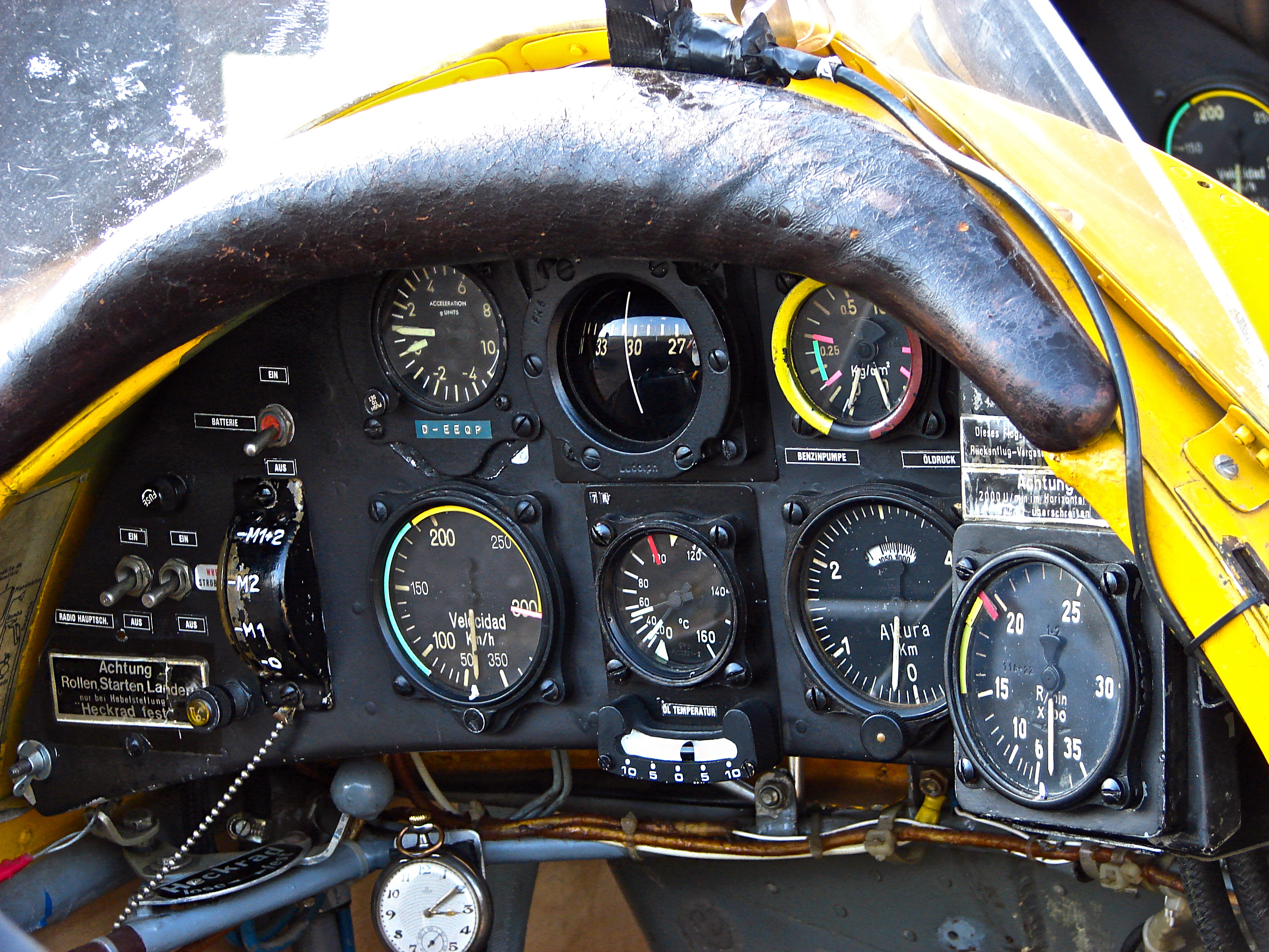 Cockpit d'un Bücker Bü 131 Jungmann